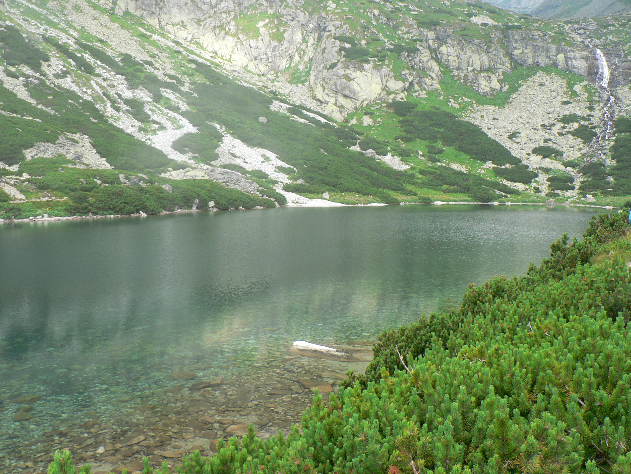 Wielicki Staw widziany spod Śląskiego Domu w Dolinie Wielickiej